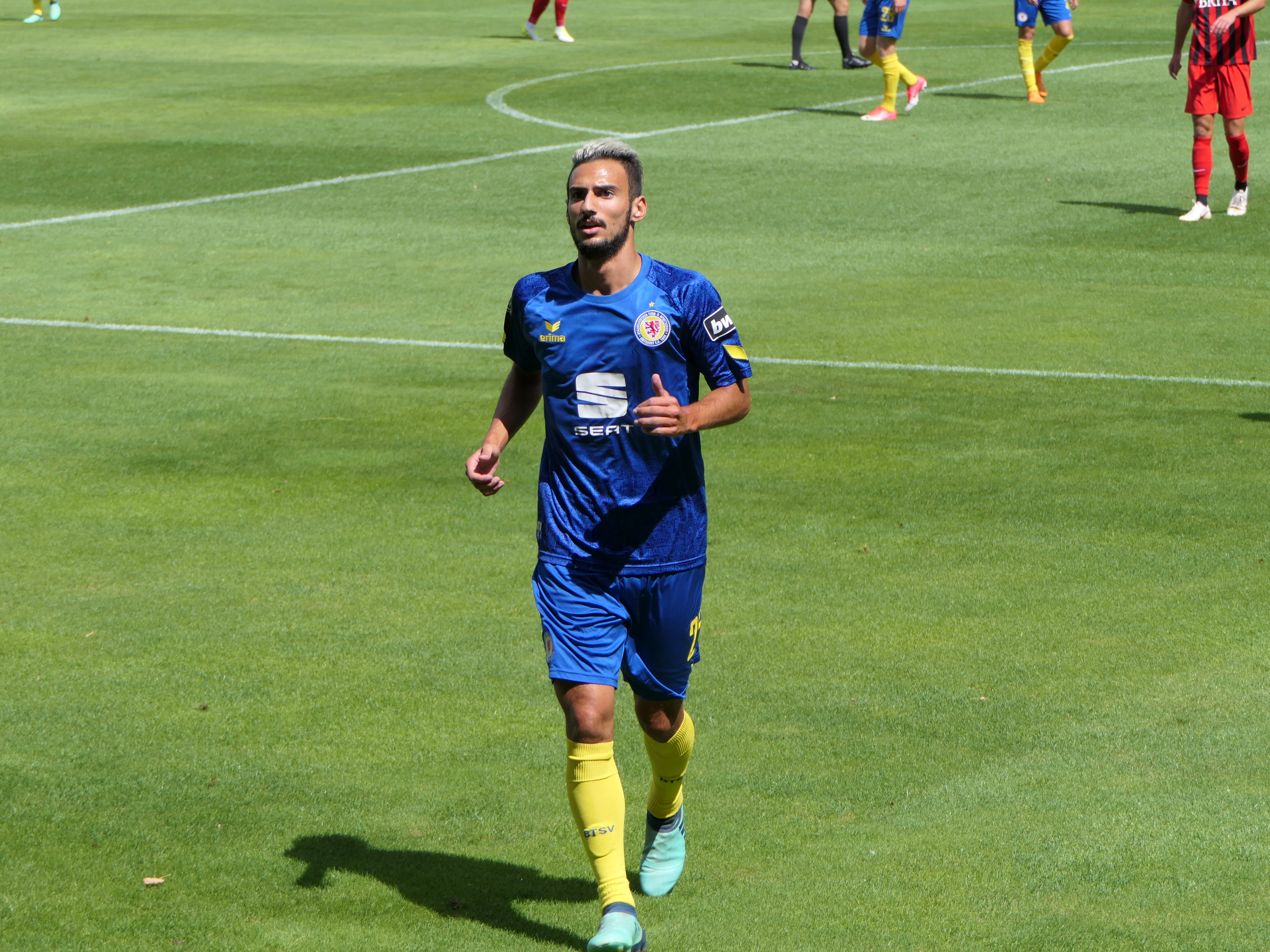 Der Fussballprofi Onur Bulut im Trikot von Eintracht Braunschweig beim Auswärtsspiel beim SV Wehen Wiesbaden am 11.08.2018